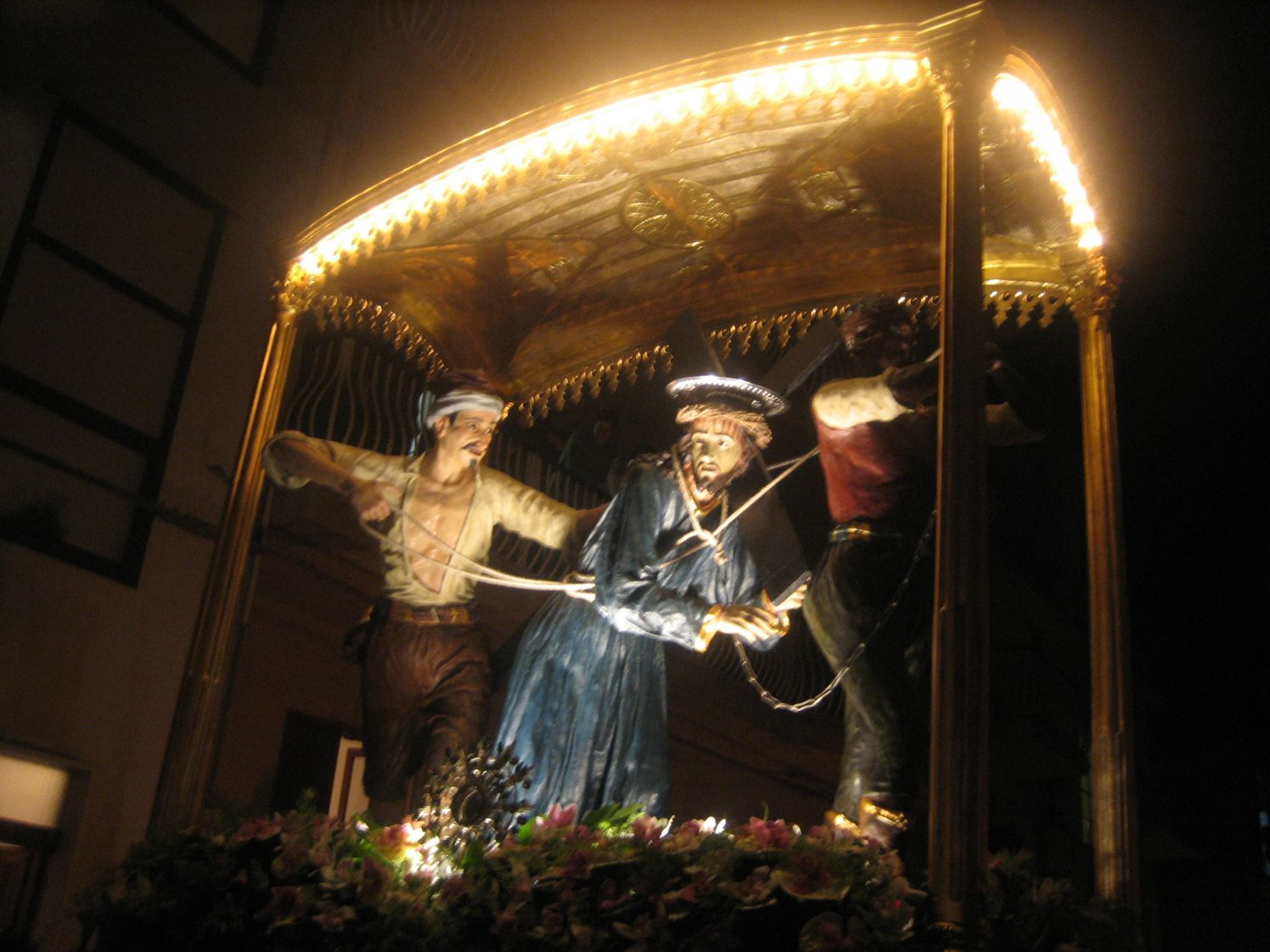 Foto liberamente concessa da G.Caschetto e non protetta da copyright